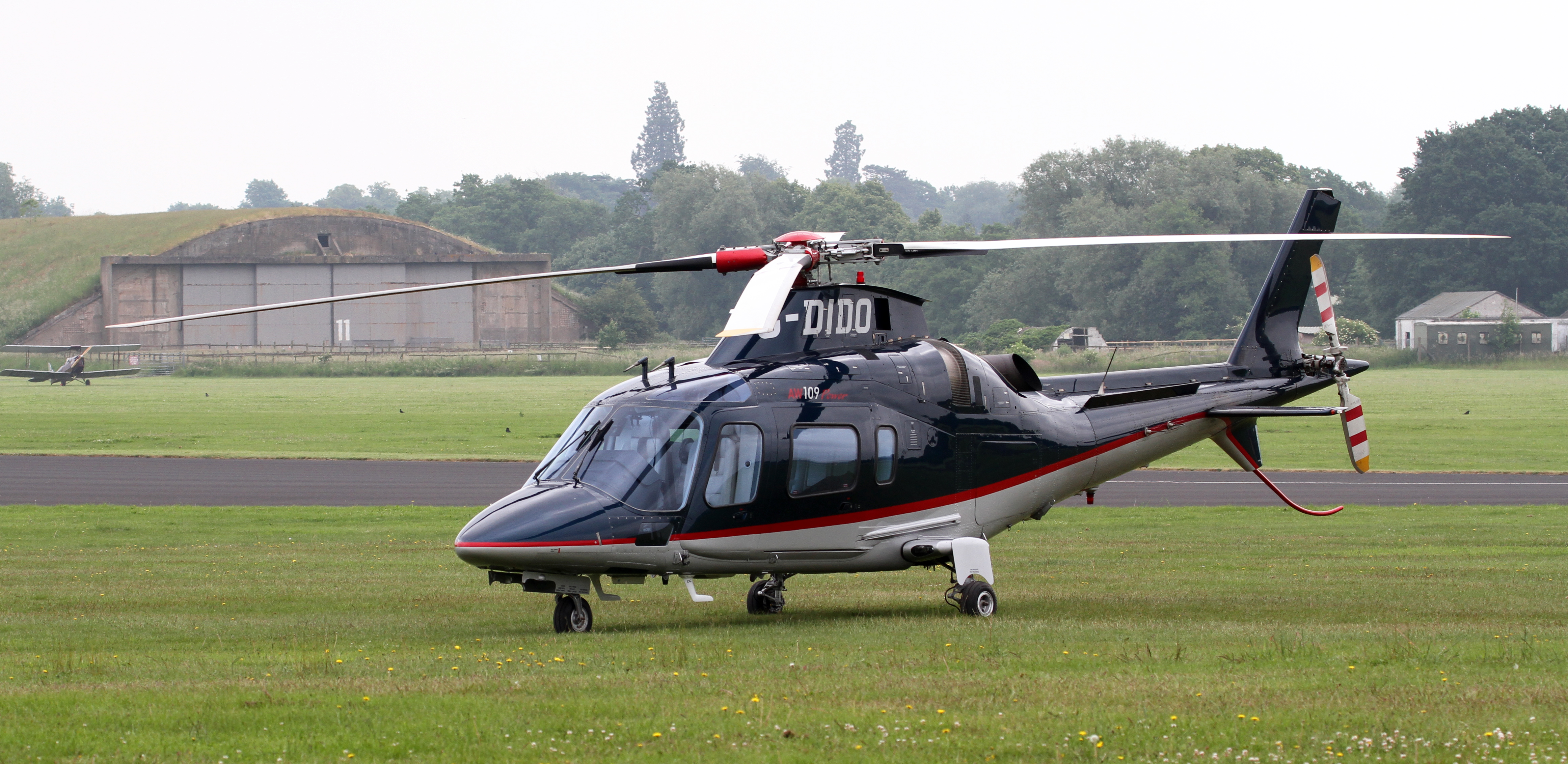 G-DIDO - AgustaWestland AW109